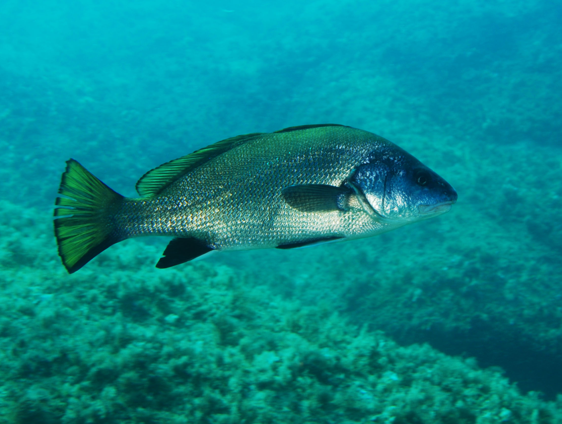 zwarte ombervis of zeeraaf